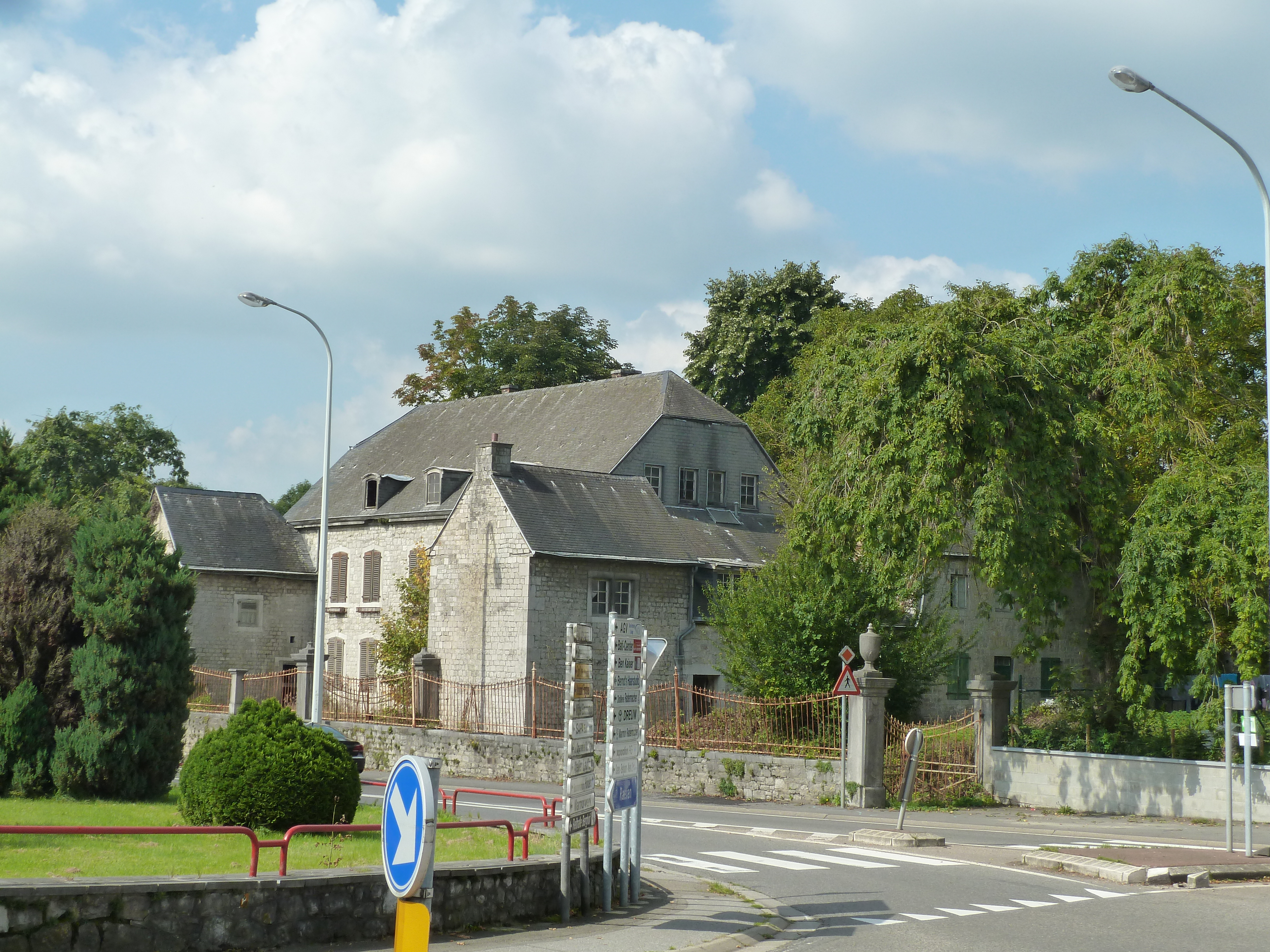 Eupener Strasse 8, Eynatten, Raeren, België